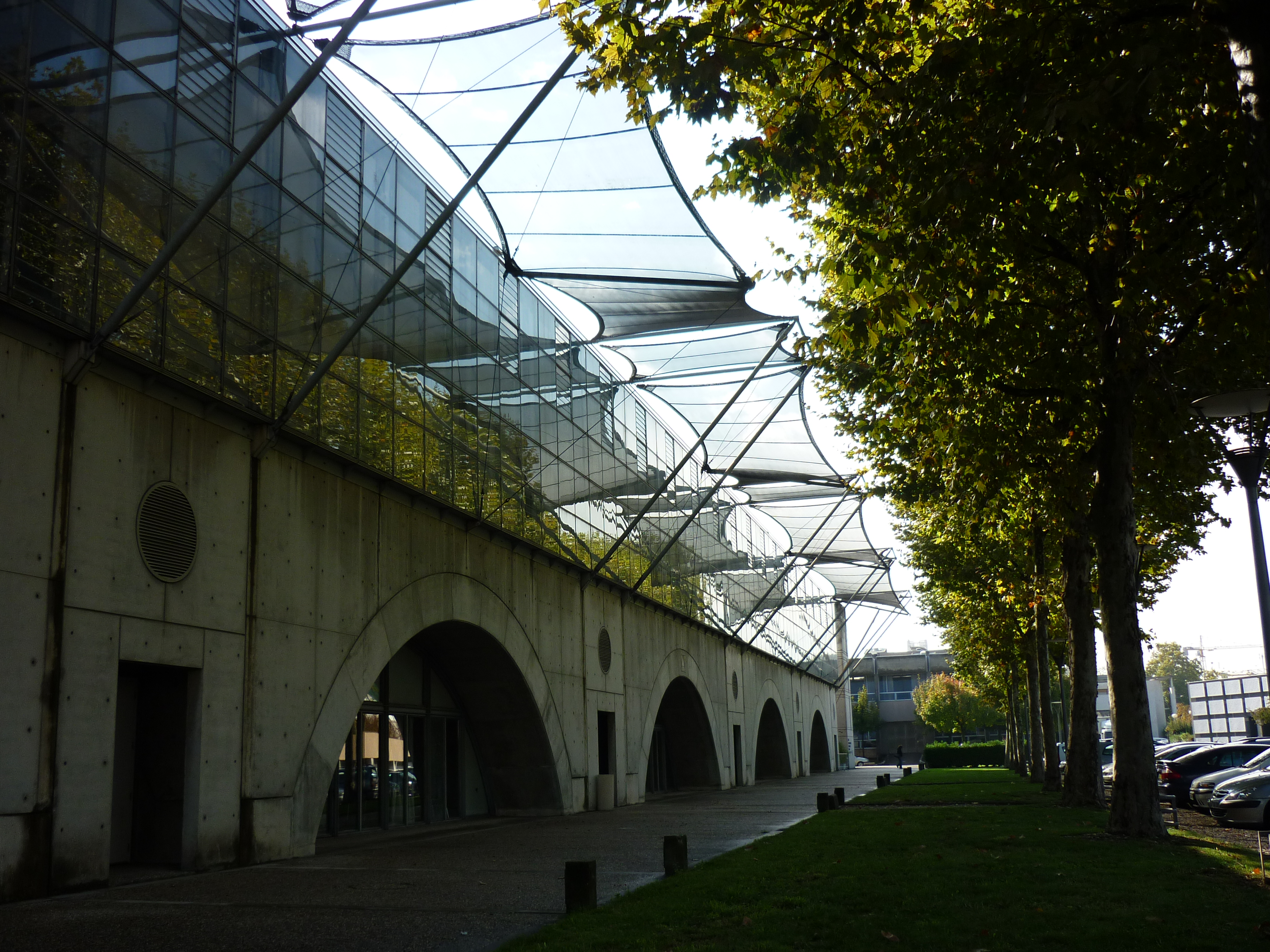 Ecole d'architecture de vaulx-en-velin, façade avant, Françoise-Hélène JOURDA